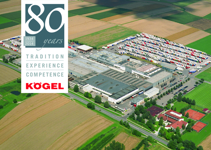 Kögel Werk in Burtenbach